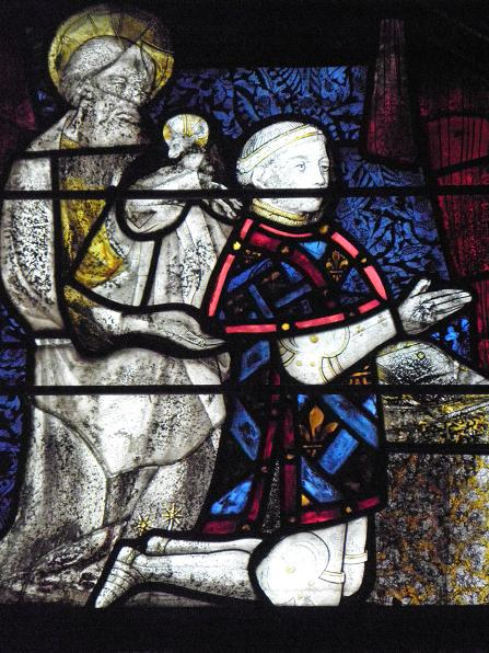 Vitrail figurant le duc Jean Ier d'Alençon et St-Jean-Baptiste en la basilique Notre-Dame de La Guerche-de-Bretagne. Vitrail du XVe siècle. Localisation : seconde travée du collatéral sud de la basilique.